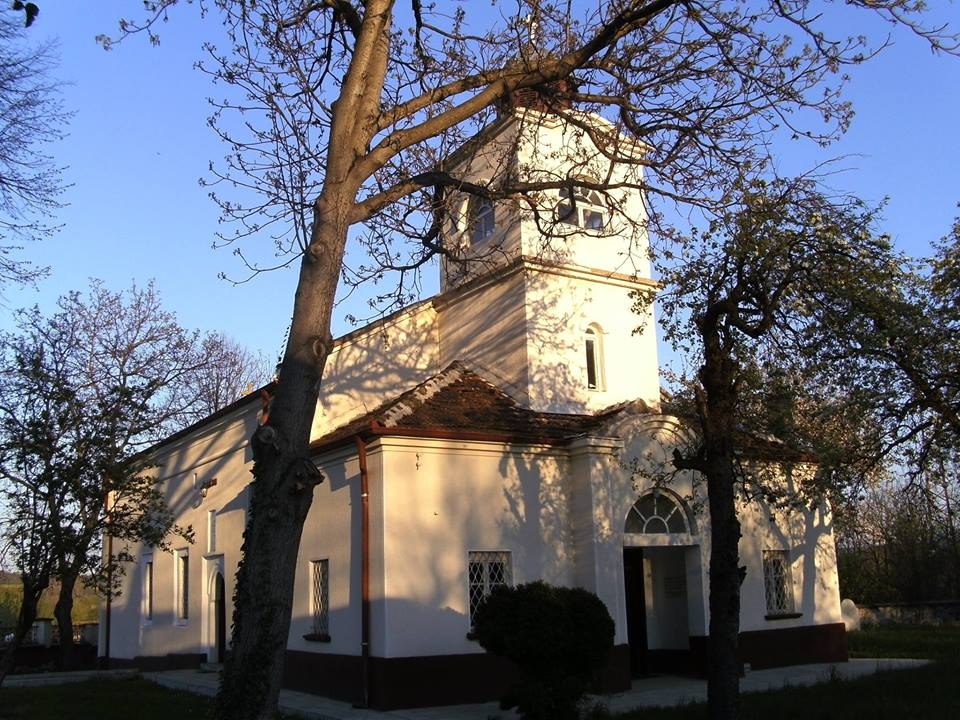 Църквата на селото